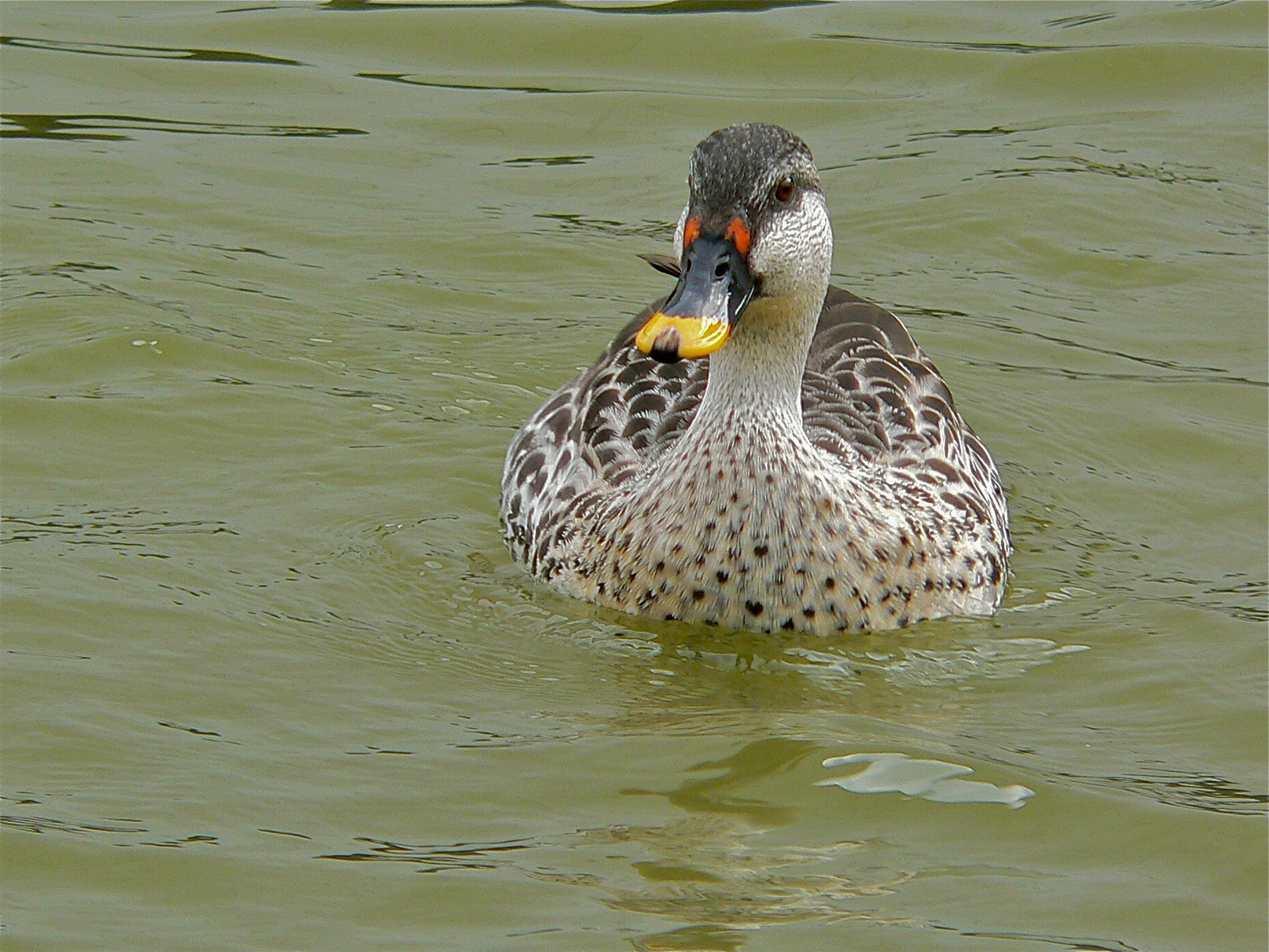 Parc Phoenix, Nice, Alpes-Maritimes, FRANCE